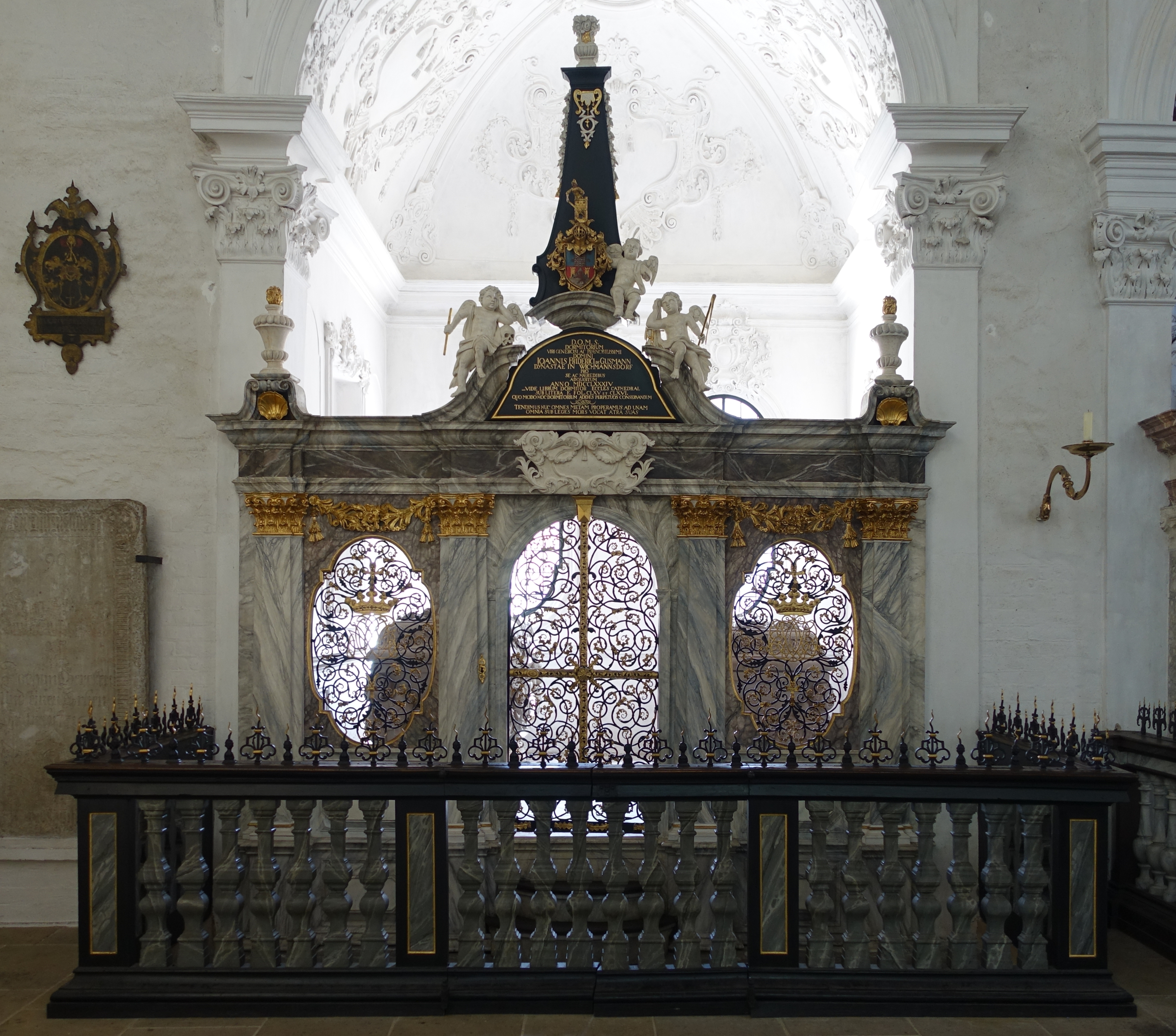 Gusmann-Kapelle im Lübecker Dom